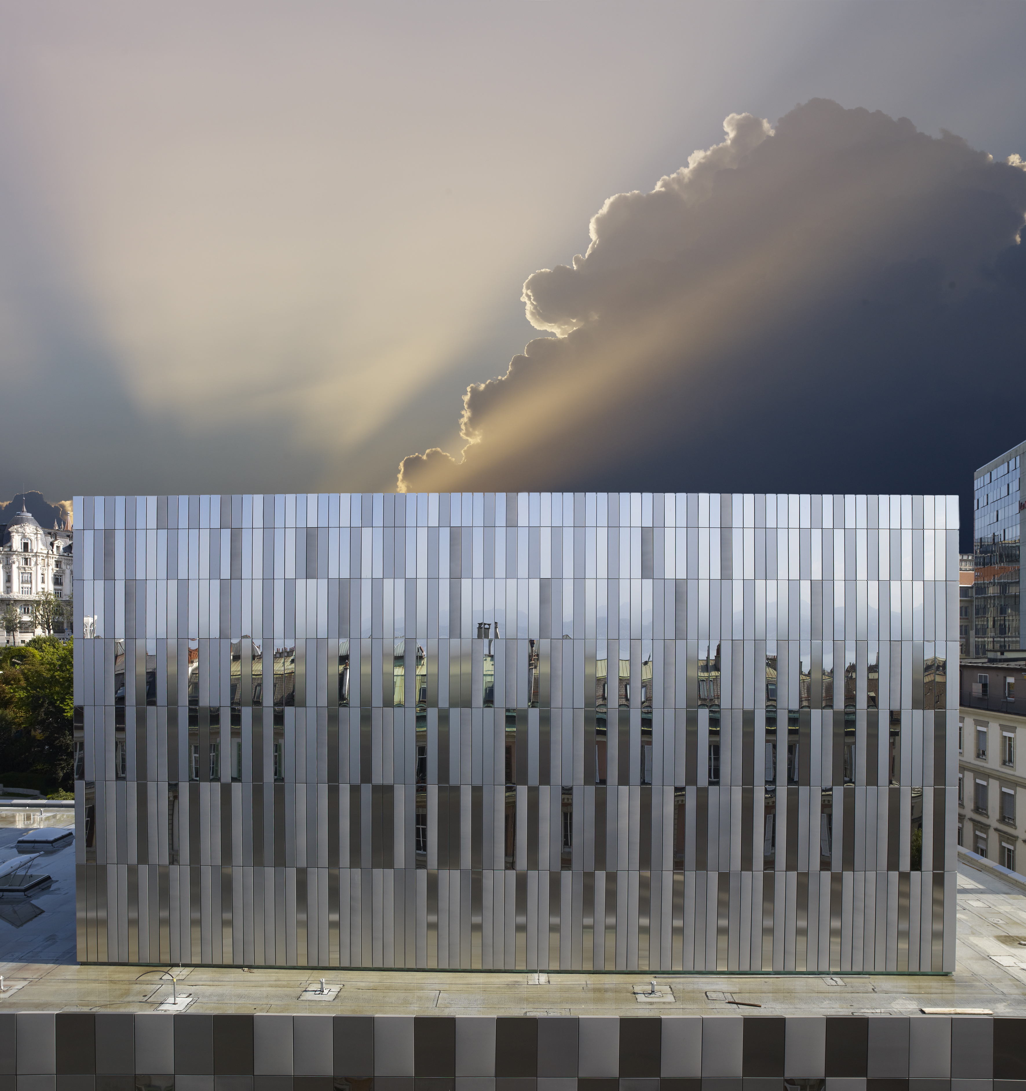 Façade de la cage de scène de lOpéra de Lausanne